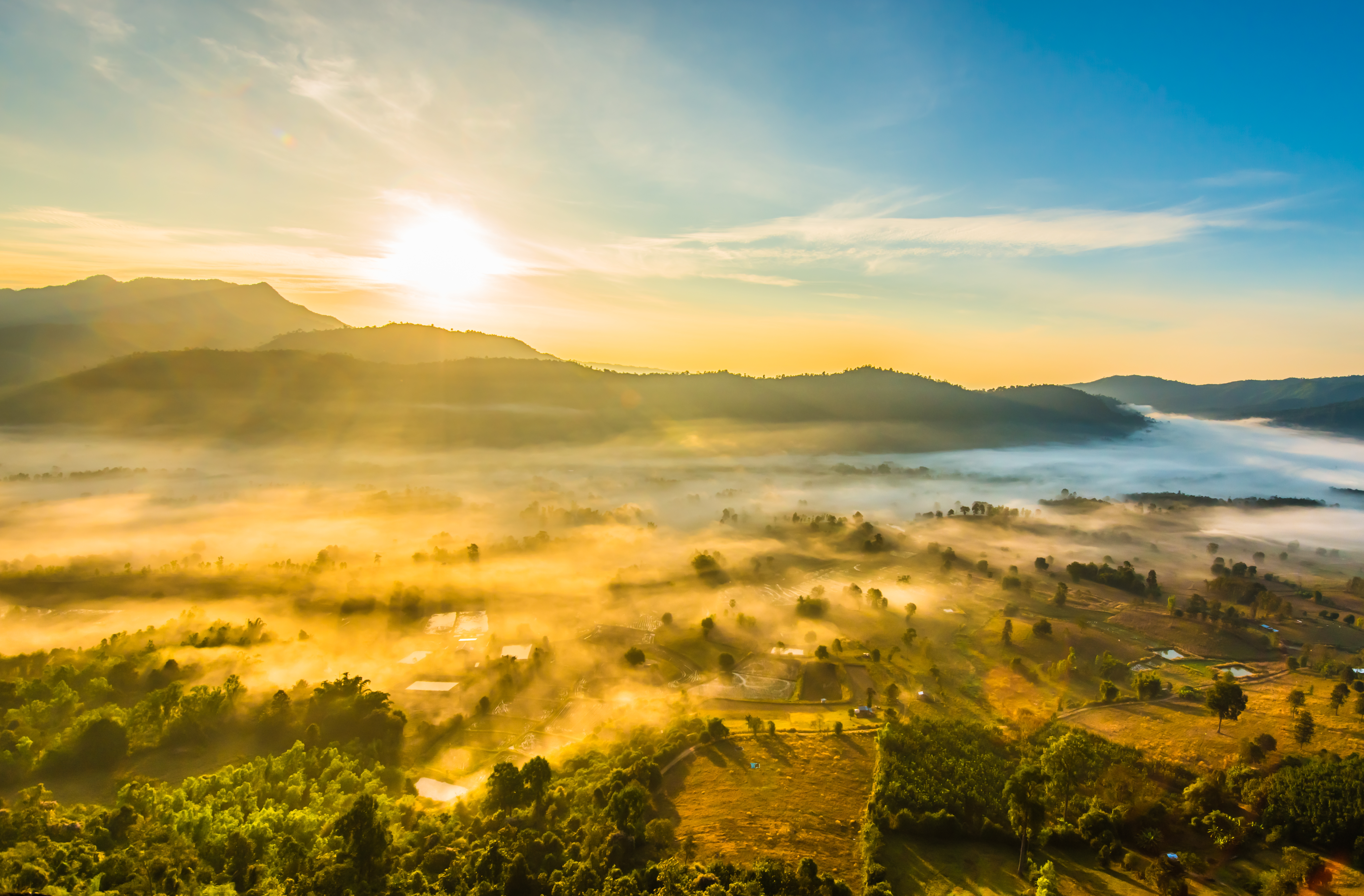 เมืองในหมอก นครแห่งเทพนิยาย